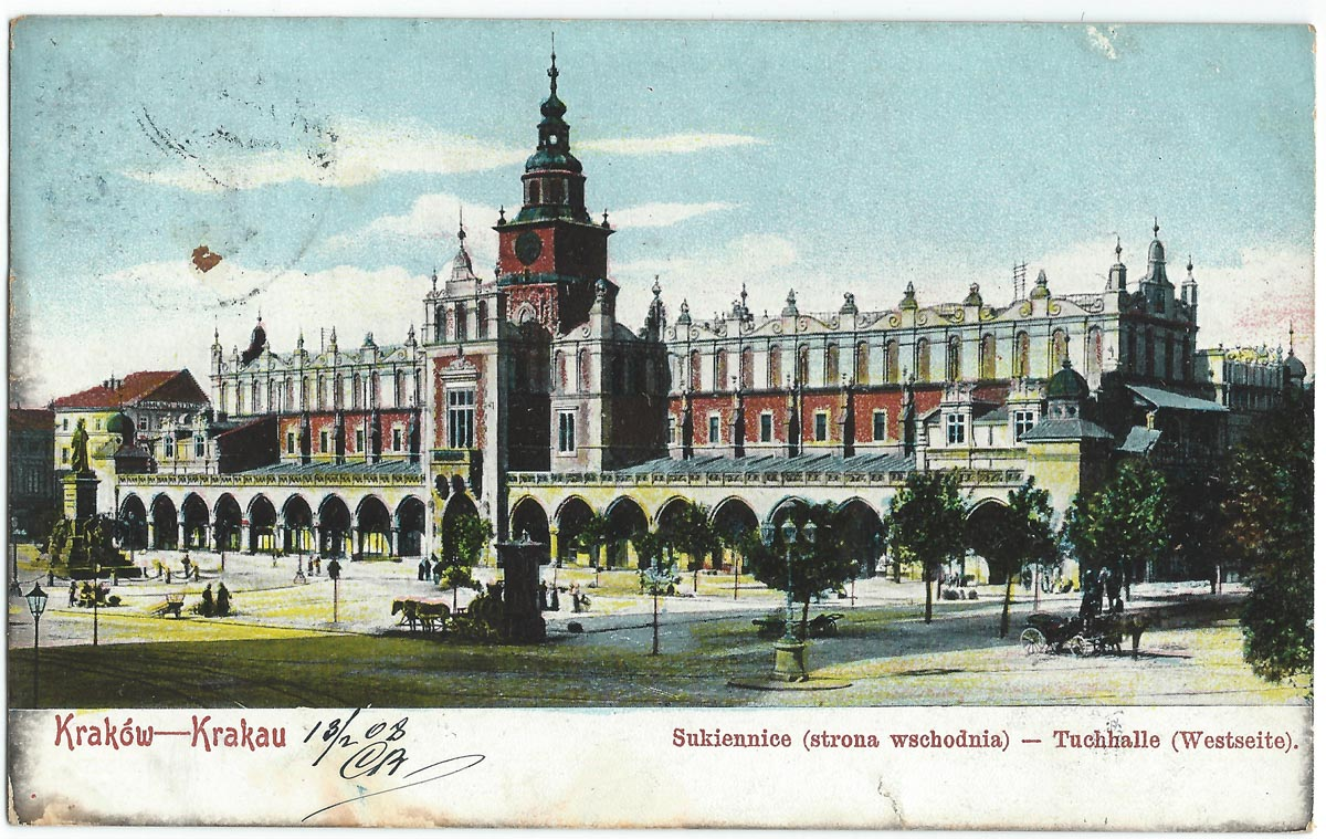 Vue de Cracovie, au début du XXe siècle.